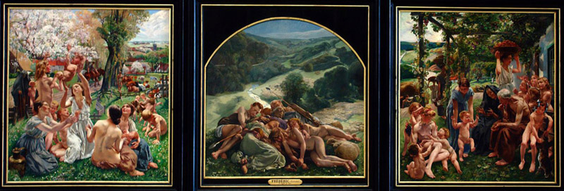 The Golden Age (Léon Frédéric)